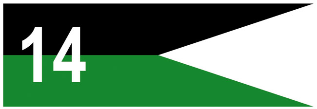 WZÓR GRAFICZNY PROPORCZYKA NA BERET 14 Dywizjon Artylerii Samobieżnej im. gen. bryg. Wacława Wieczorkiewicza